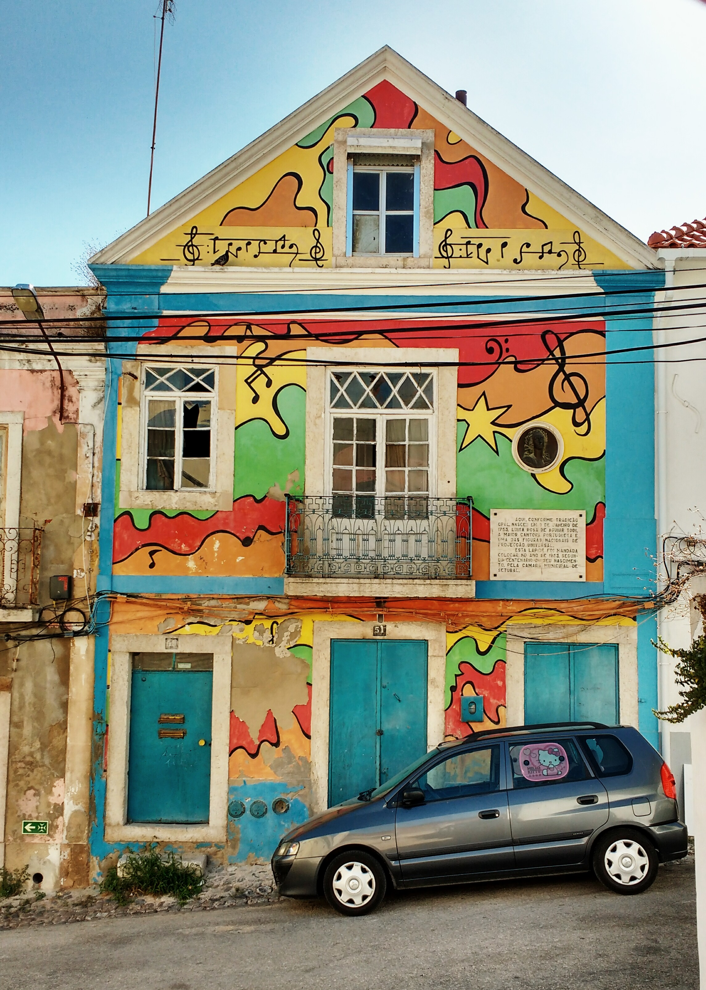 Zustand des Geburtshauses von Luisa Todi im Jahr 2017. Von einem Museum keine Spur.